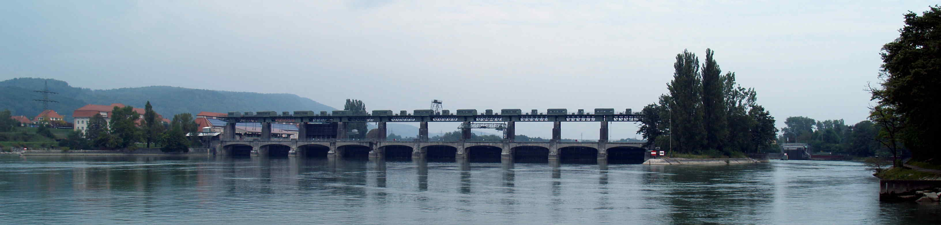 Zwilingskraftwerk Augst/Wyhlen von der Unterwasserseite ganz rechst Schleuse Augst